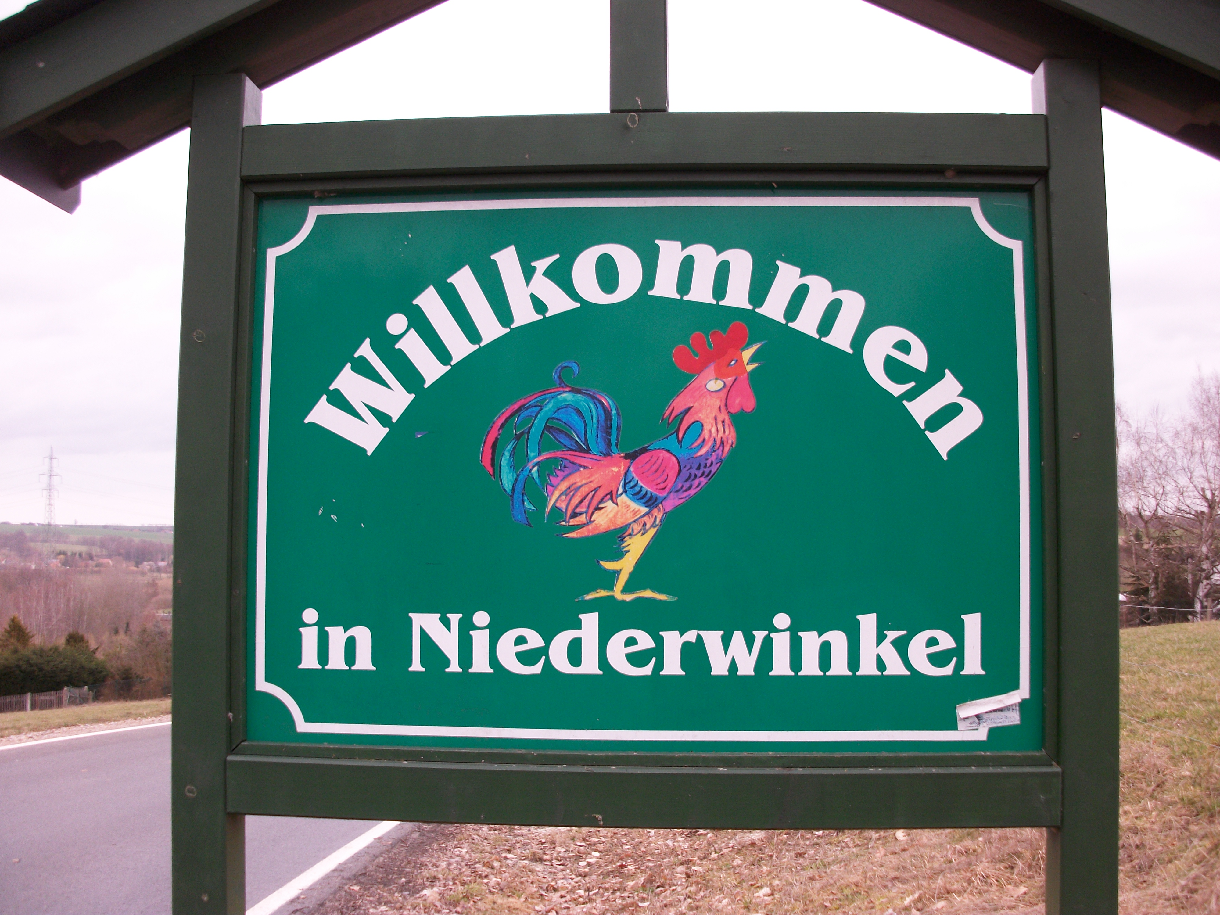 Niederwinkel, Ortsteingang